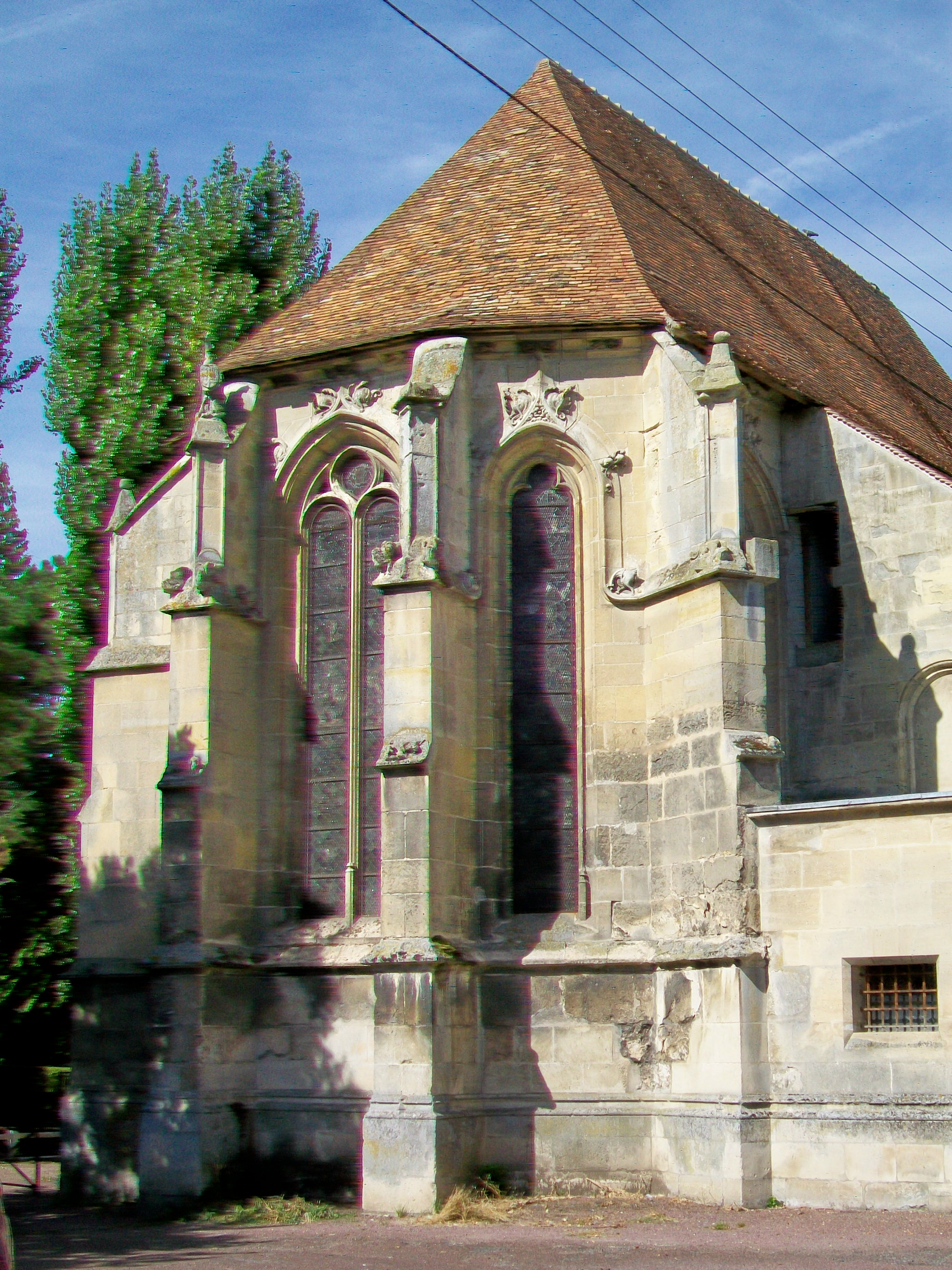 Vue rapprochée du chœur, orienté vers le sud-est.